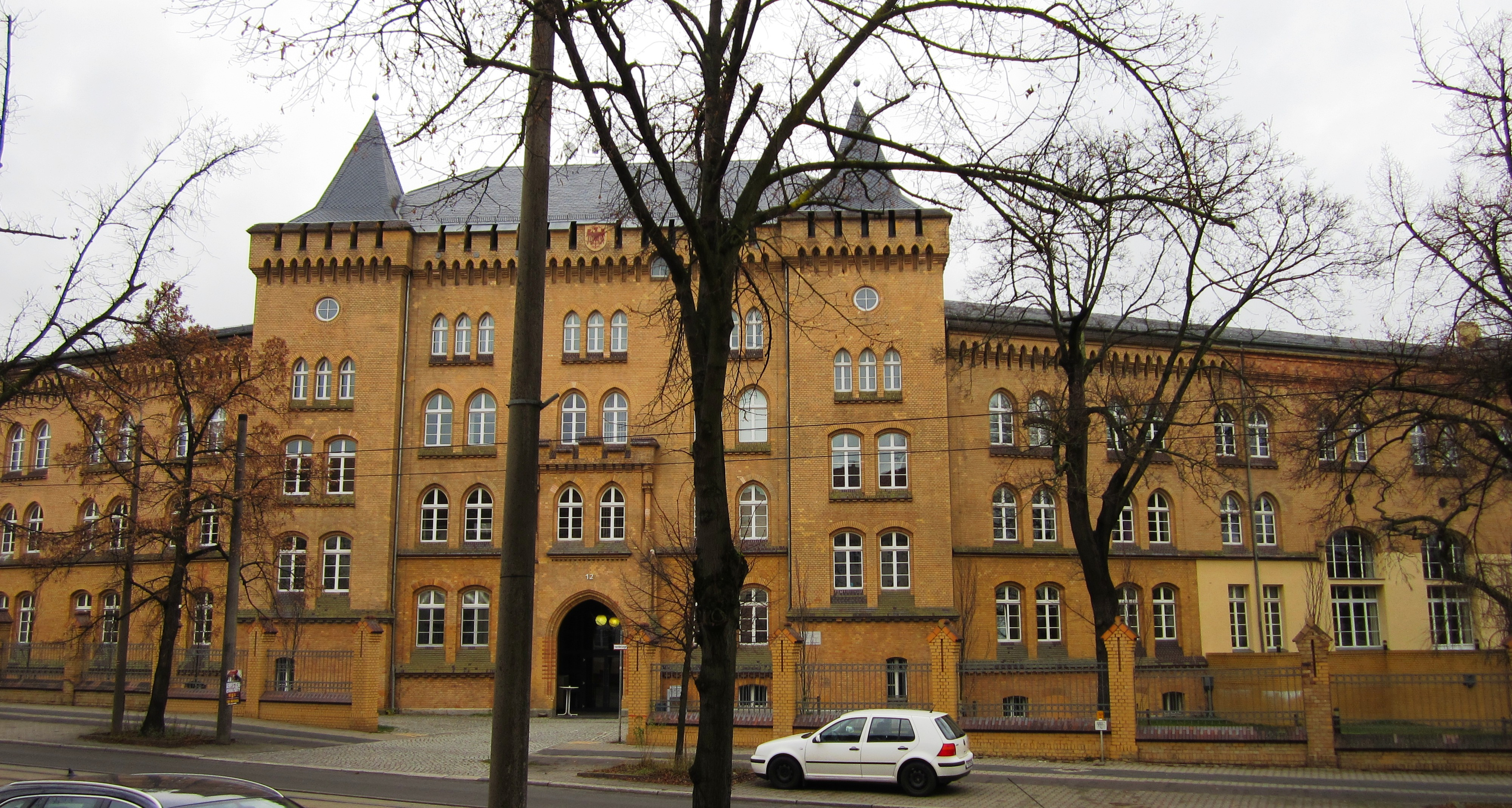 Denkmalgeschütztes Gebäude in Frankfurt (Oder), August-Bebel-Straße 12. Es handelt sich um die Kaserne des Grenadierregiments Prinz Karl von Preußen Nr. 12